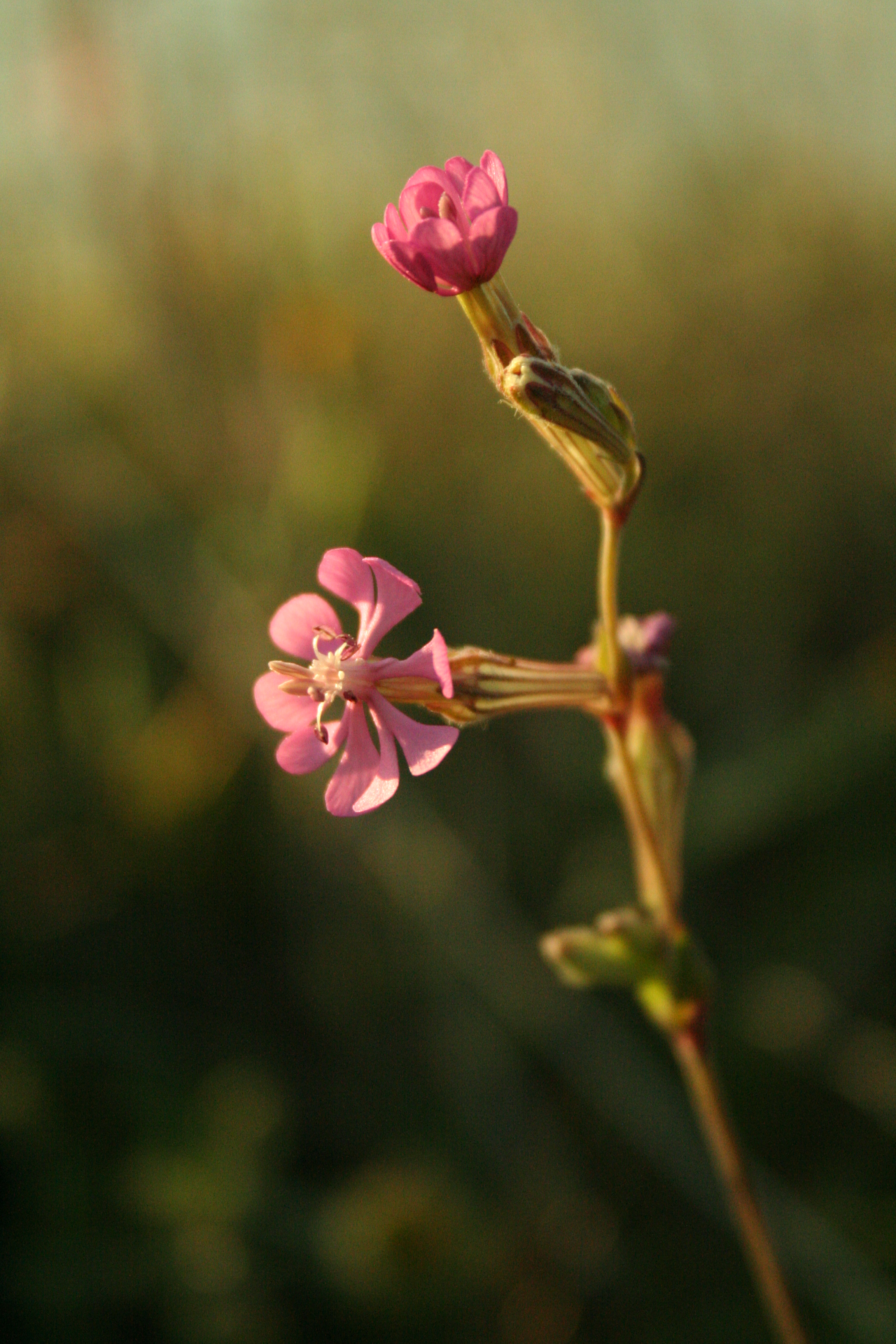 Silene colorata en flor en el municipio toledano de Las Herencias, España.